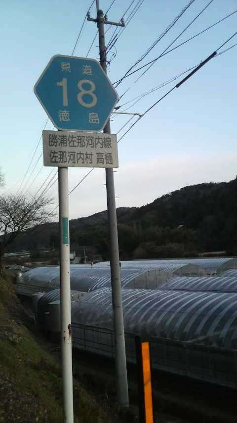 徳島県道18号標識